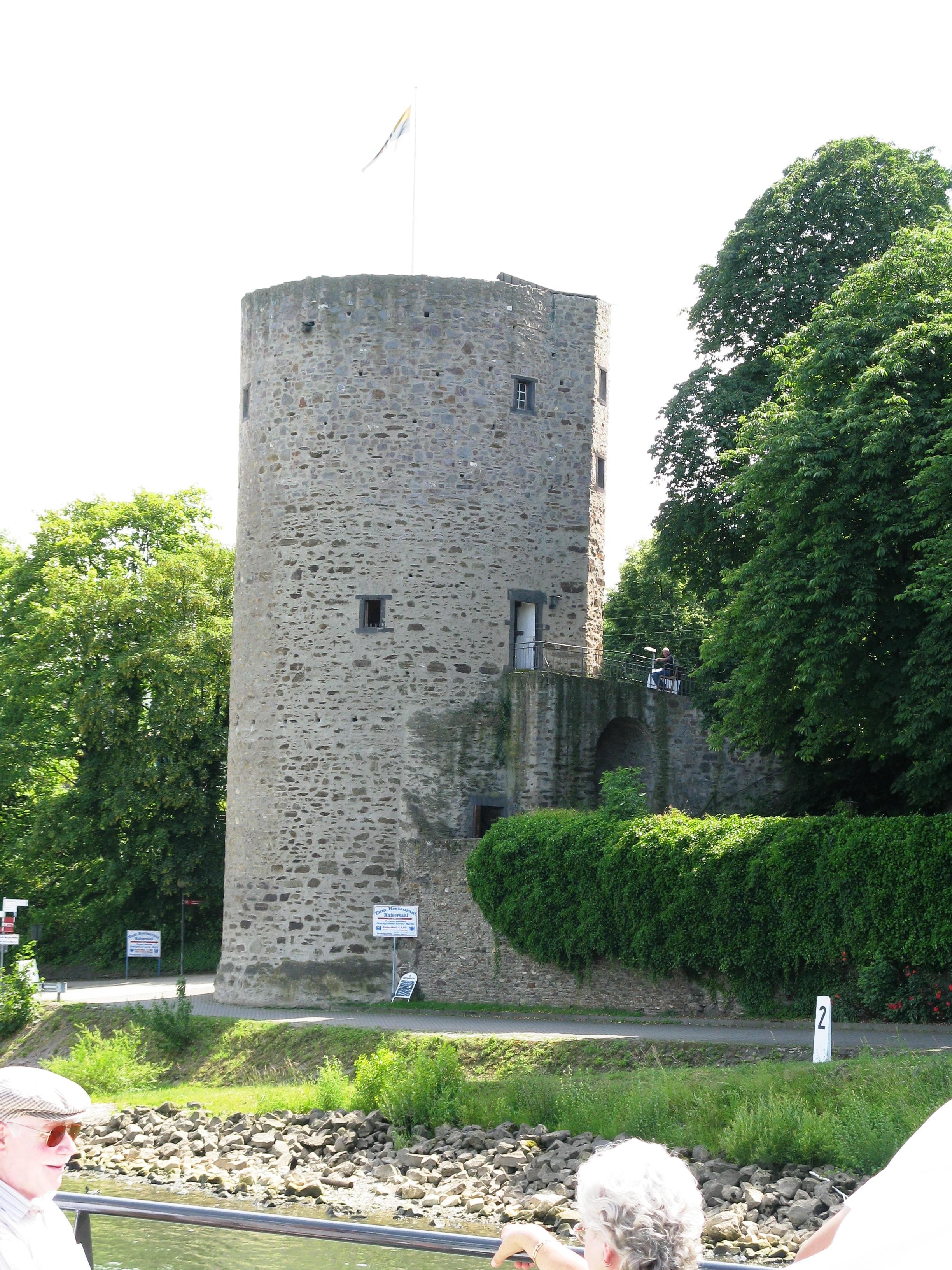 Rhens - Rheinfront vom Schiff aus gesehen, großer Turm